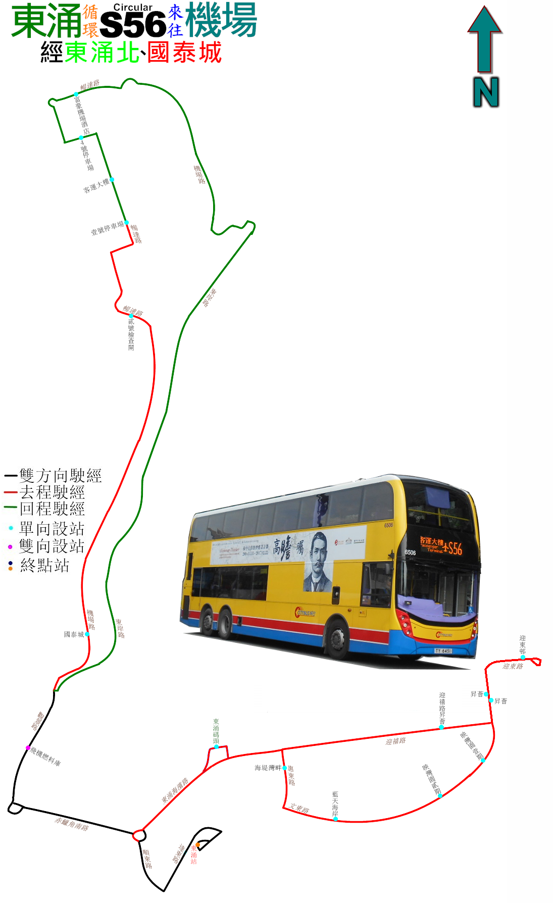 中文（香港）: 機場巴士S56線的走線圖